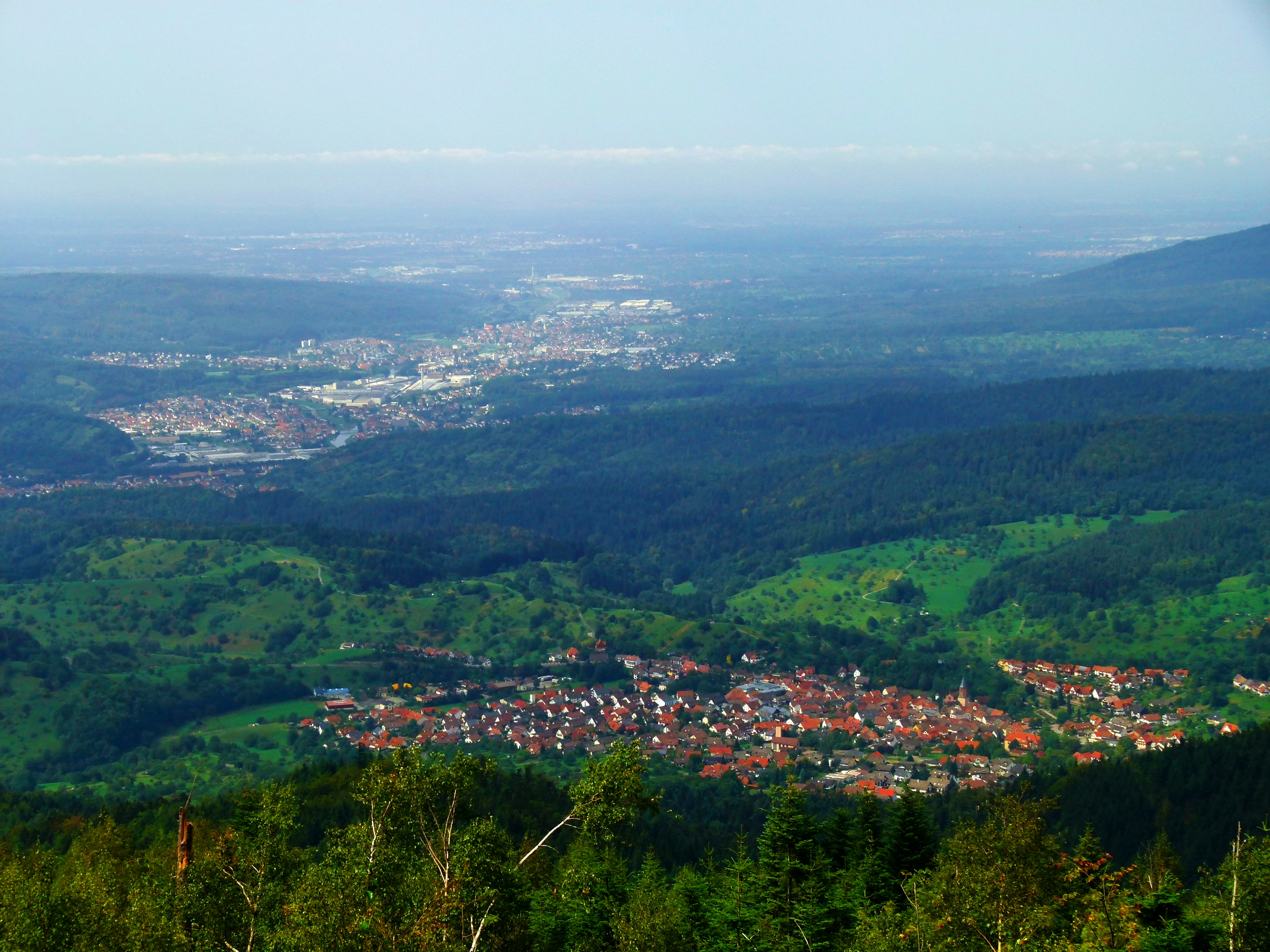 Murgtal